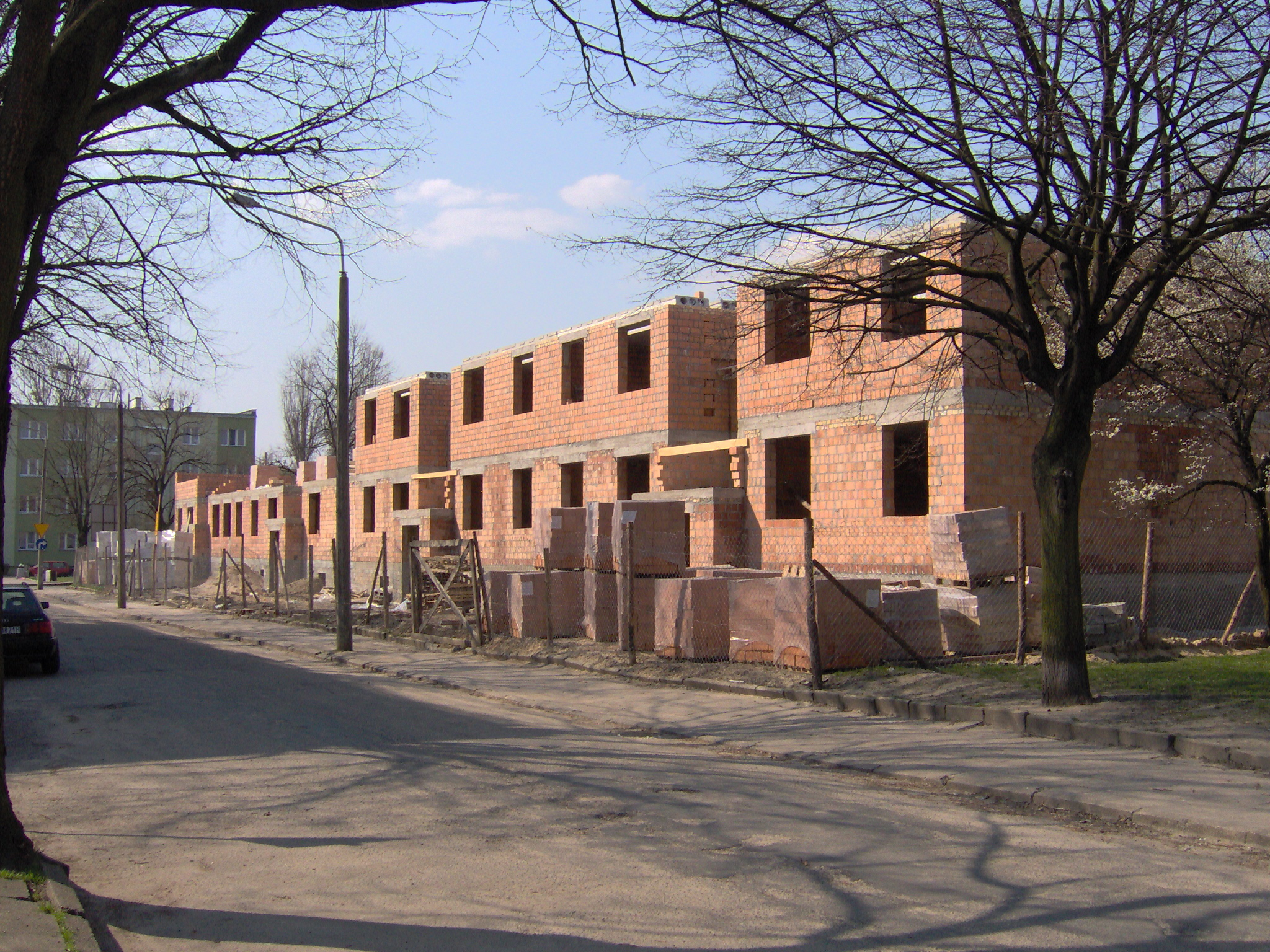 Budowa bloki przy ul. Jesionowej12 (2007 r.)